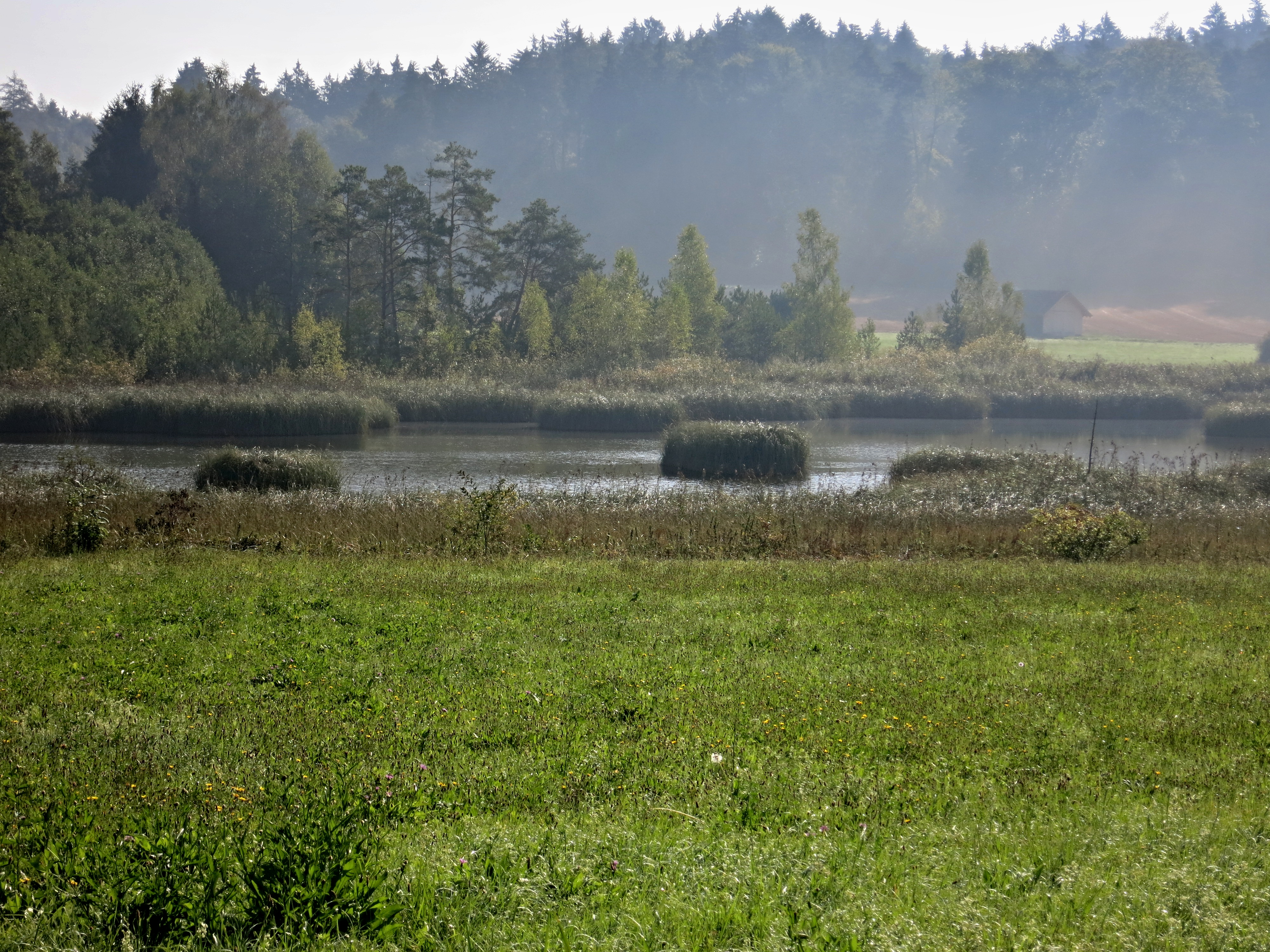 Barchetsee